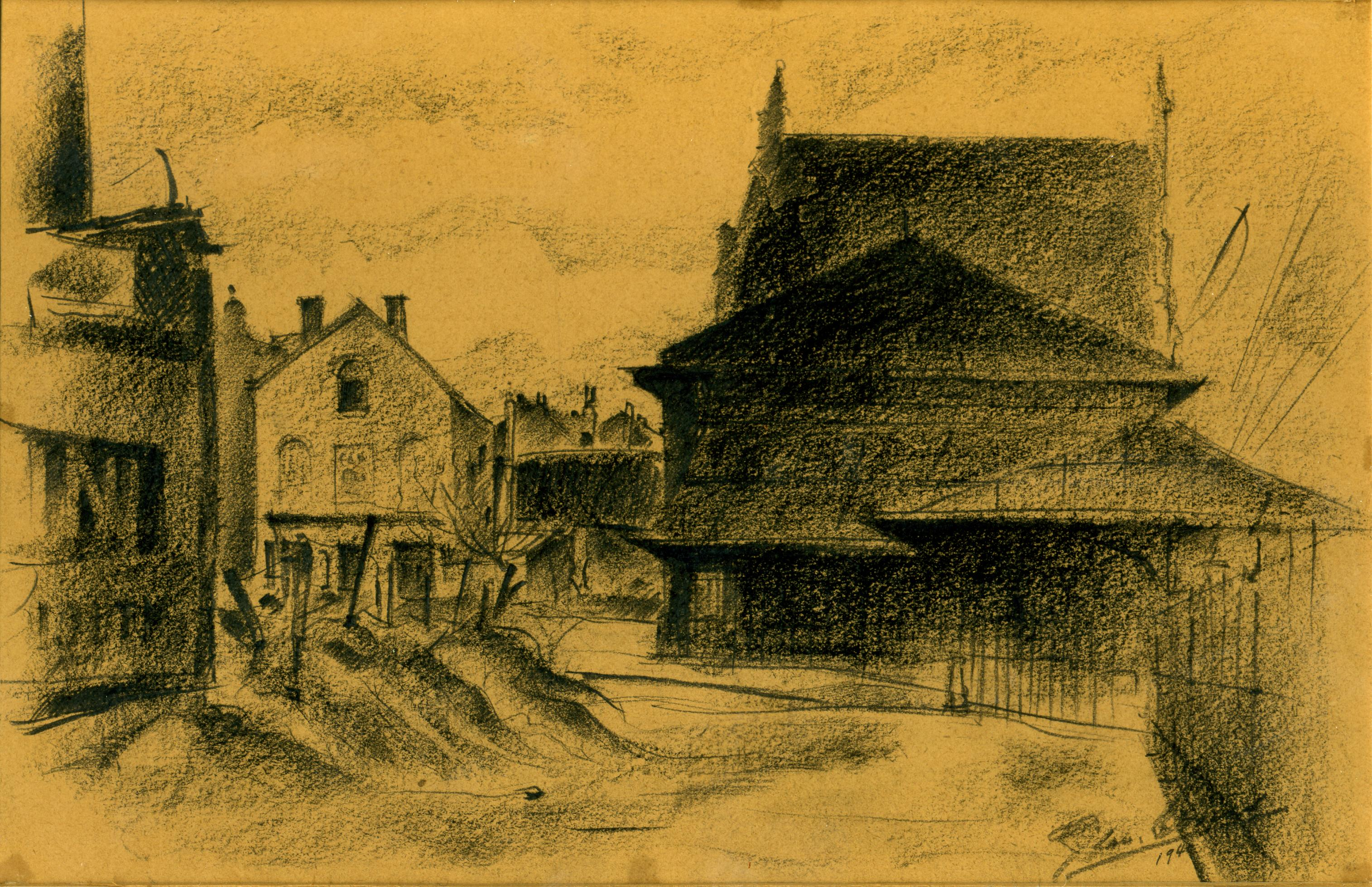 La petite gare à Jette (Bruxelles), dessin par Léon van Dievoet, architecte, le 22 mars 1940.